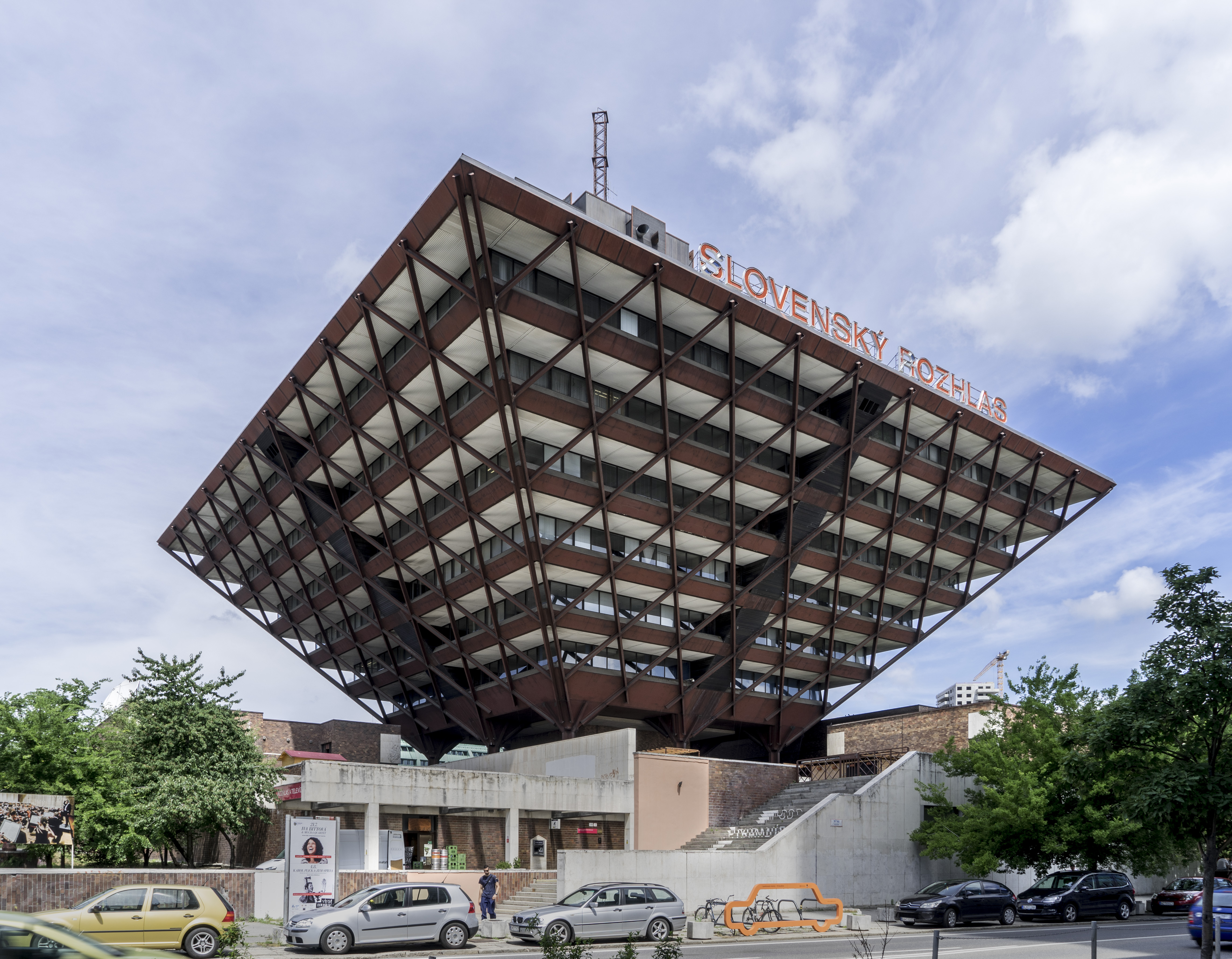 Upside down Pyramid, Bratislava